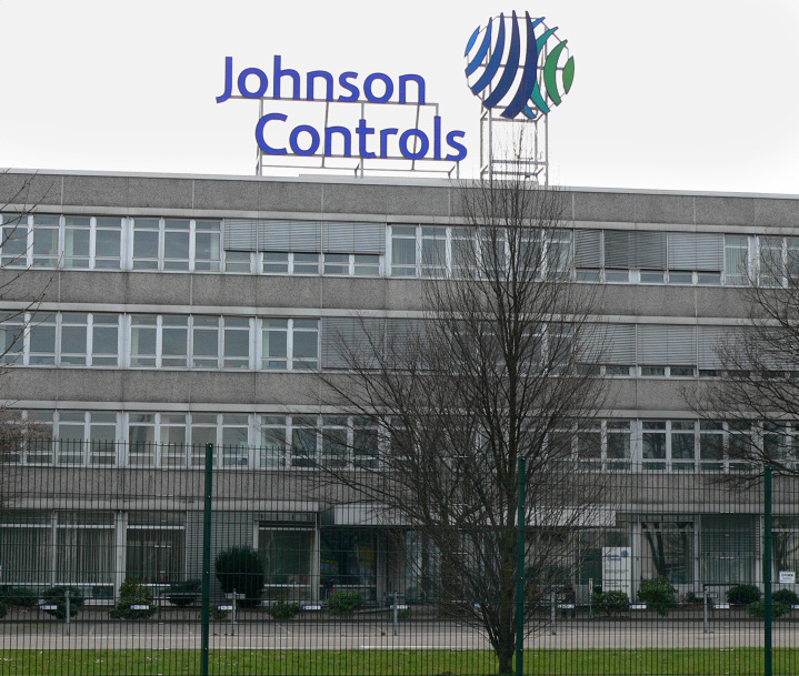 Johnson Controls Firmengebäude in Hannover